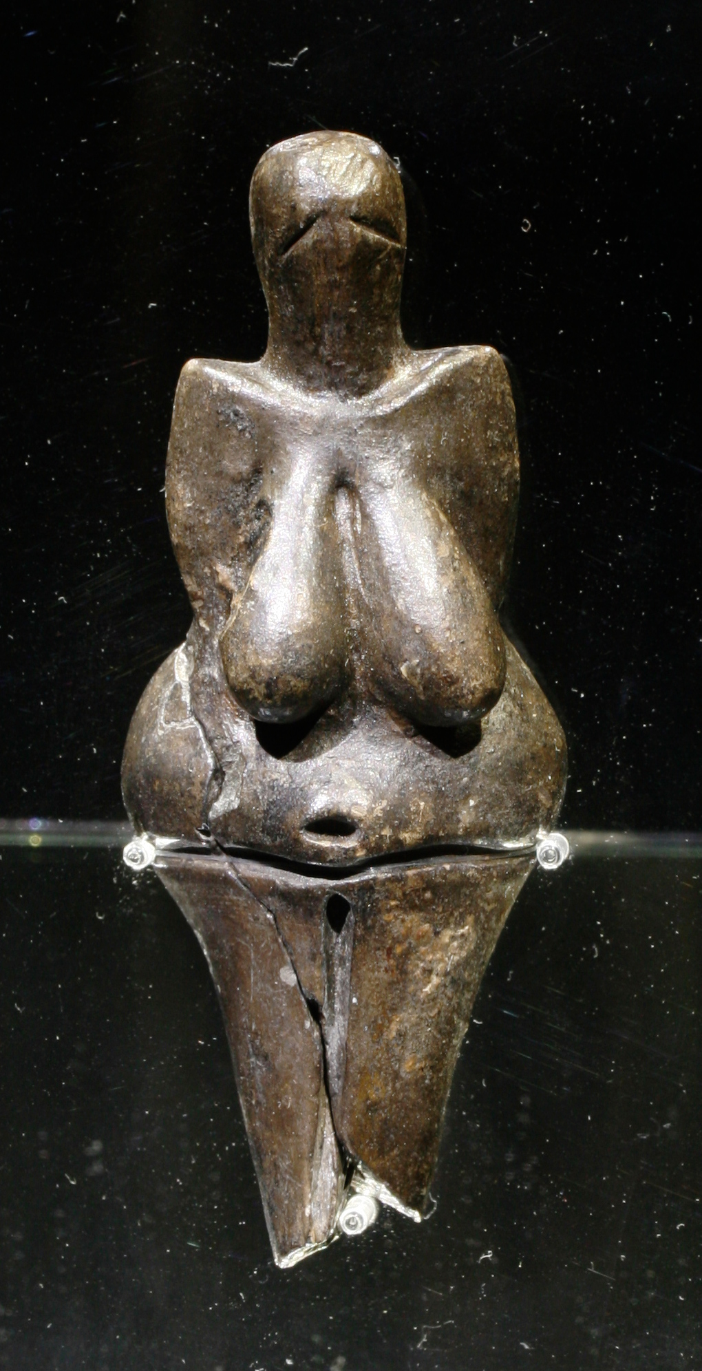 Věstonická venuše na výstavě Lovci mamutů v Národním muzeu v Praze